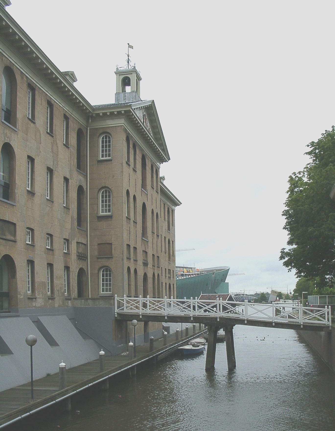 Zeemagazijn/maritime museum